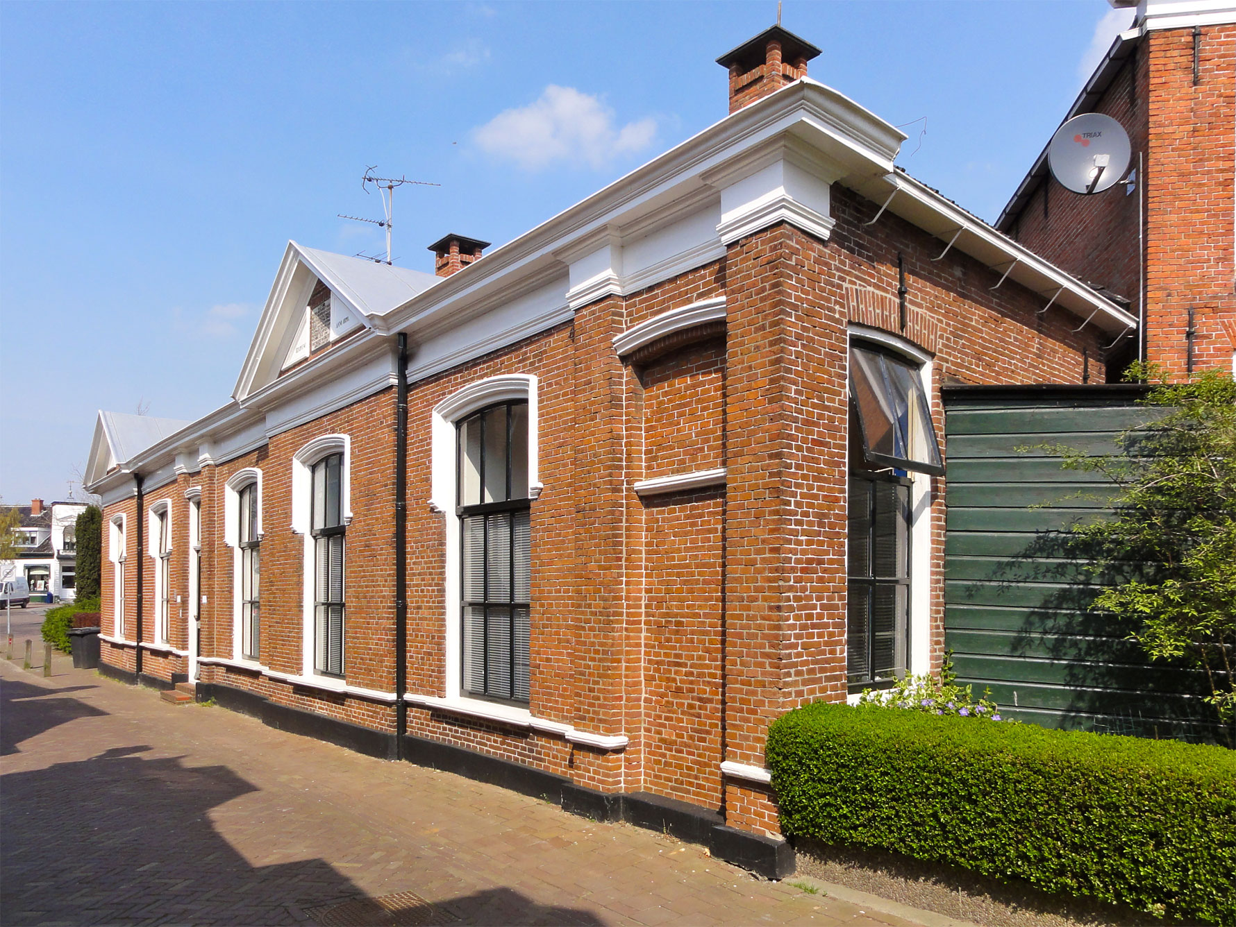 Cornelis Albert Gasthuis in de Cornelis Albertsstraat 1 te Appingedam